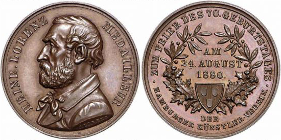 Medaille zur Feier des 70. Geburtstages des Medailleurs Heinrich Lorenz vom Hamburger Künstlerverein. 34,34 bis 34,47 mm, Bronze 17,42 Gramm, Zinn 12,09 Gramm